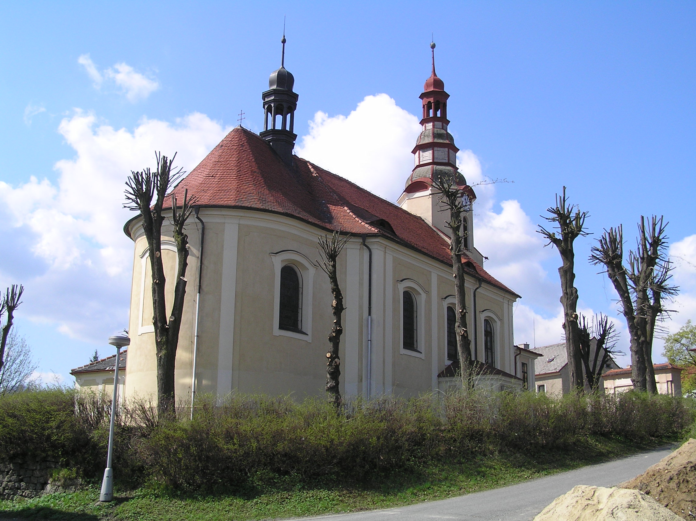 Kostel svaté Kateřiny, Stráž nad Nisou.